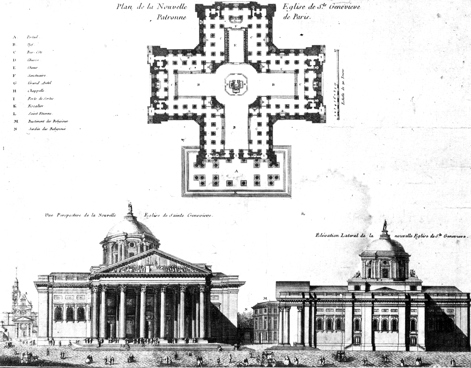 Premier projet de l'église Sainte-Geneviève (Panthéon de Paris) de Jacques-Germain Soufflot, 1756, gravure de Charpentier. « Plan de la Nouvelle Eglise Ste Genevieve Patronne de Paris Vue Perspective de la Nouvelle Eglise Sainte Geneviève Elévation latéral de la nouvelle Eglise Ste Geneviève » (sic)